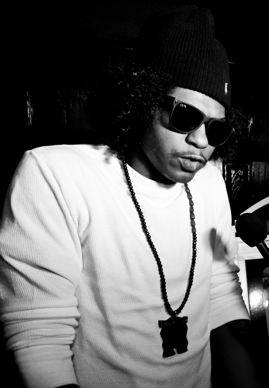 Фотография рэпера Эб-Соула